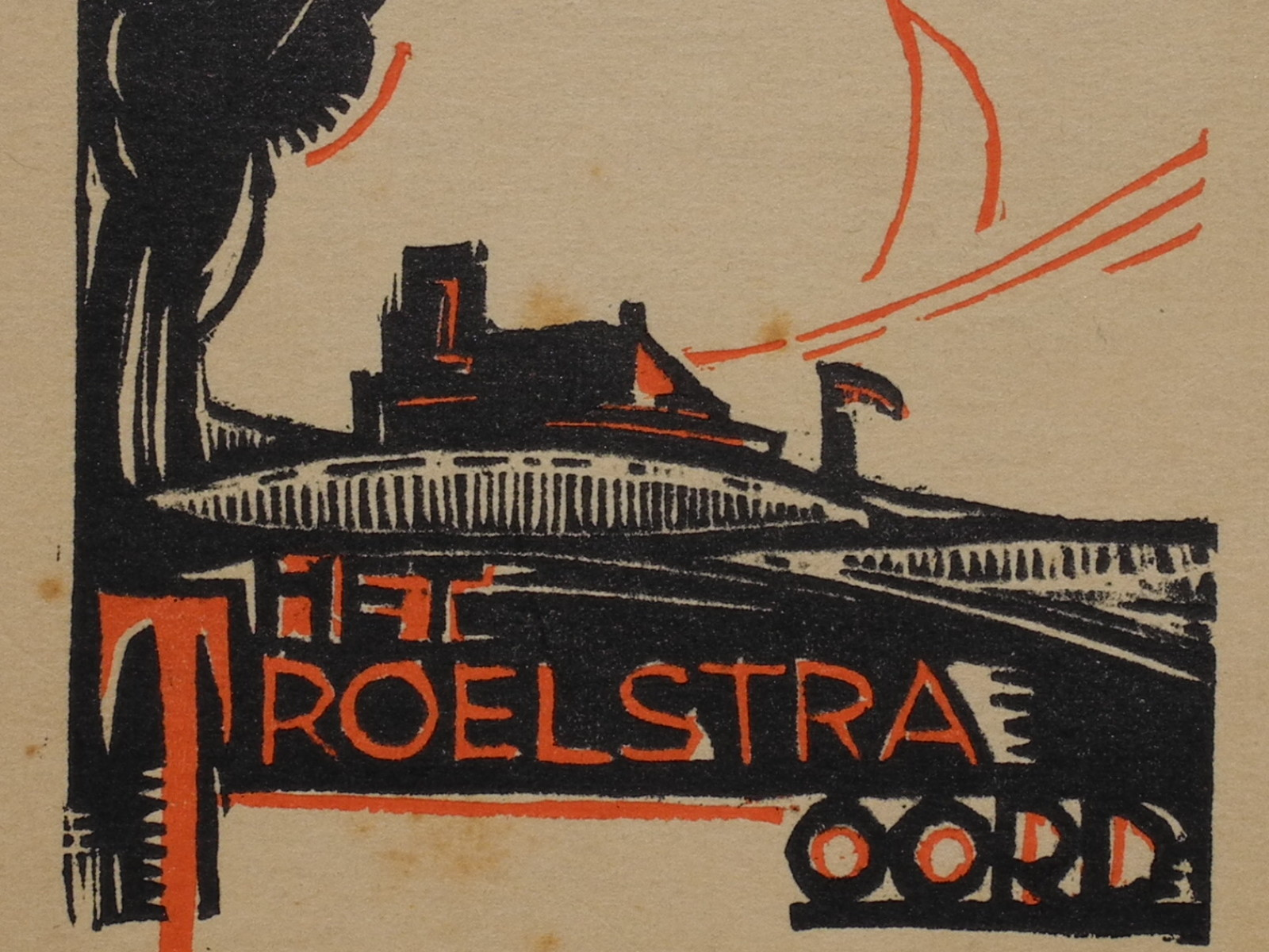 Het Troelstra oord - Beekbergen den 19 october 1926. Illustratie Fré Cohen, uitgave AJC